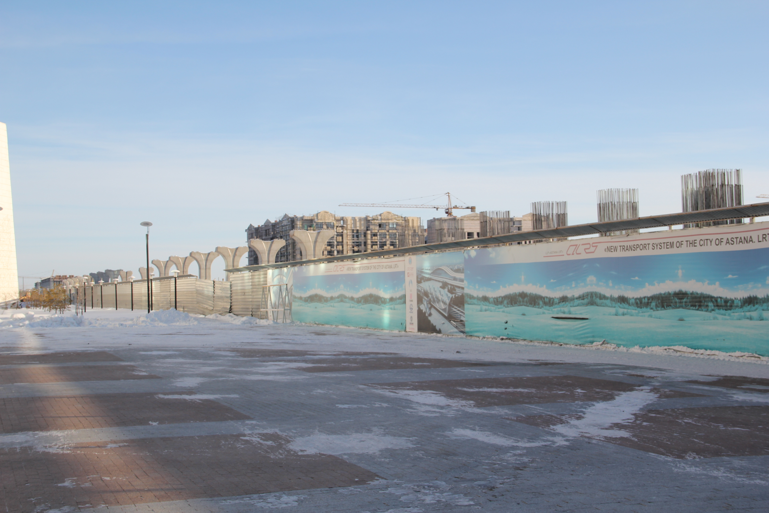 Строительство ЛРТ Астаны